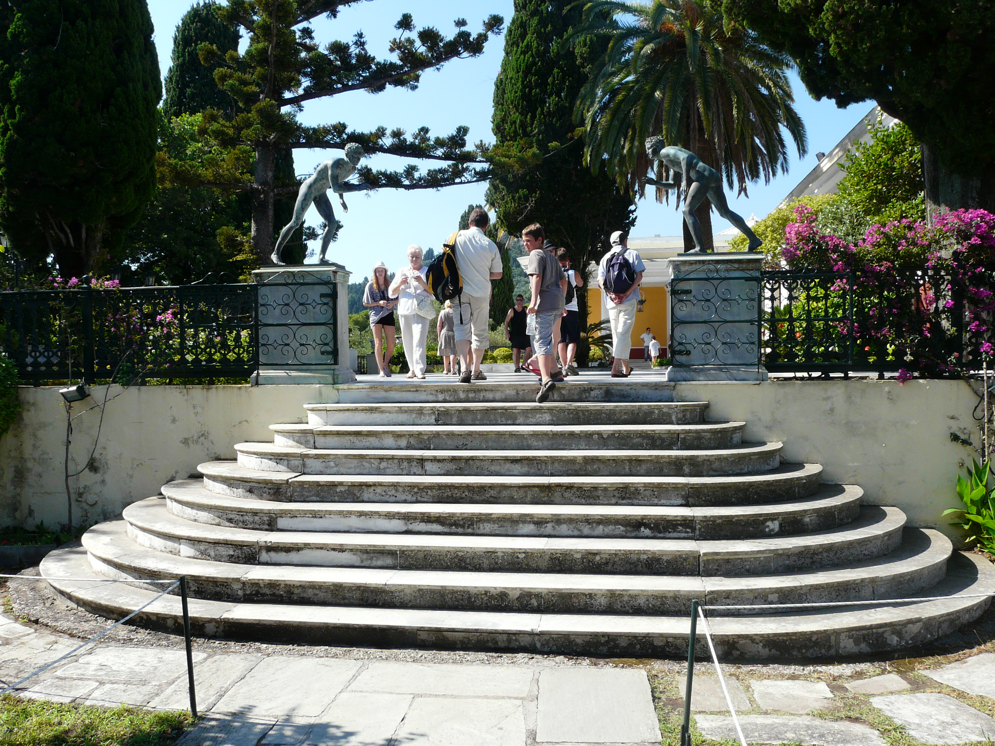 Achilleion